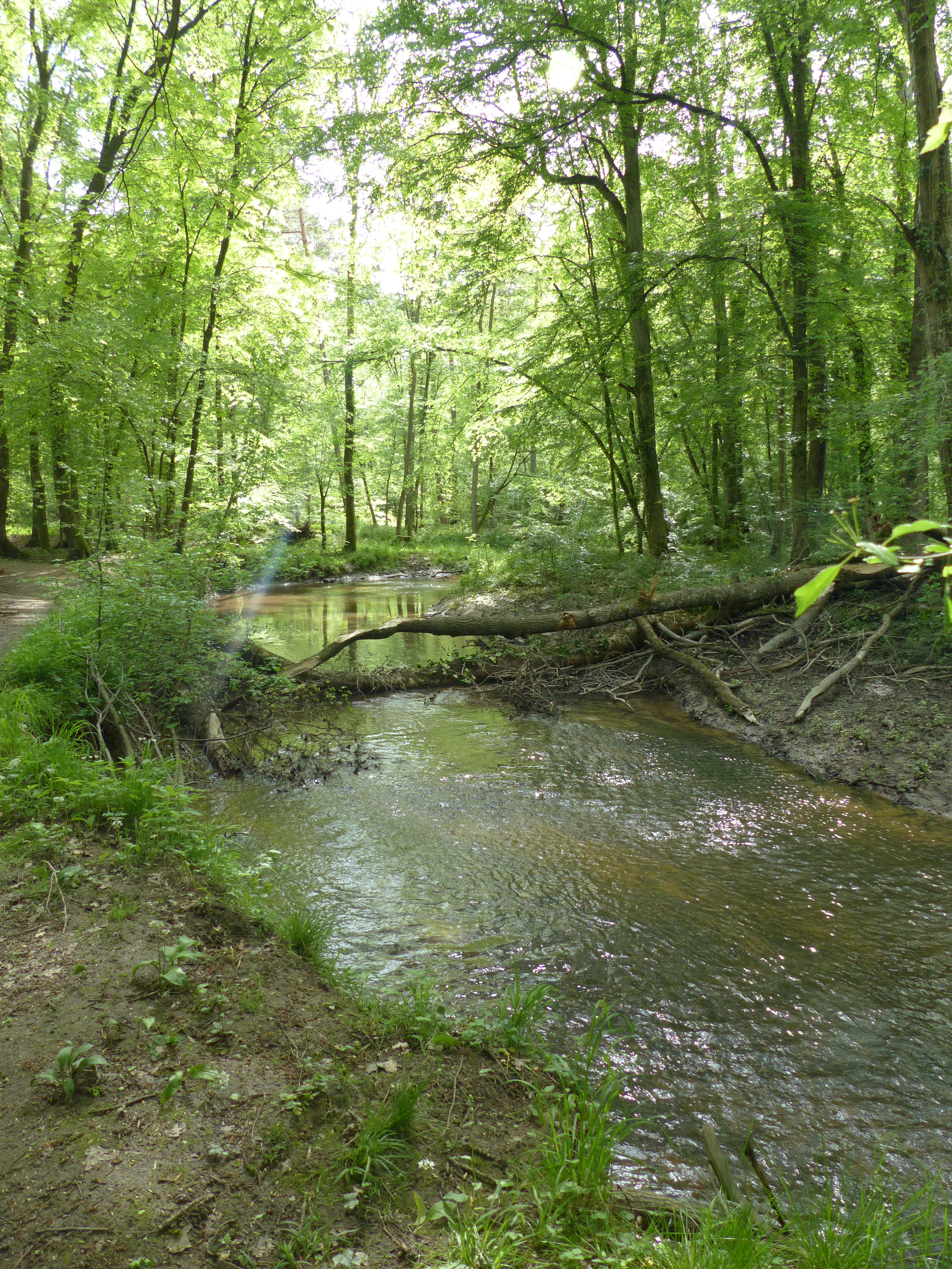 La rivière Eberbach en forêt de Haguenau, un peu en aval du Gros Chêne